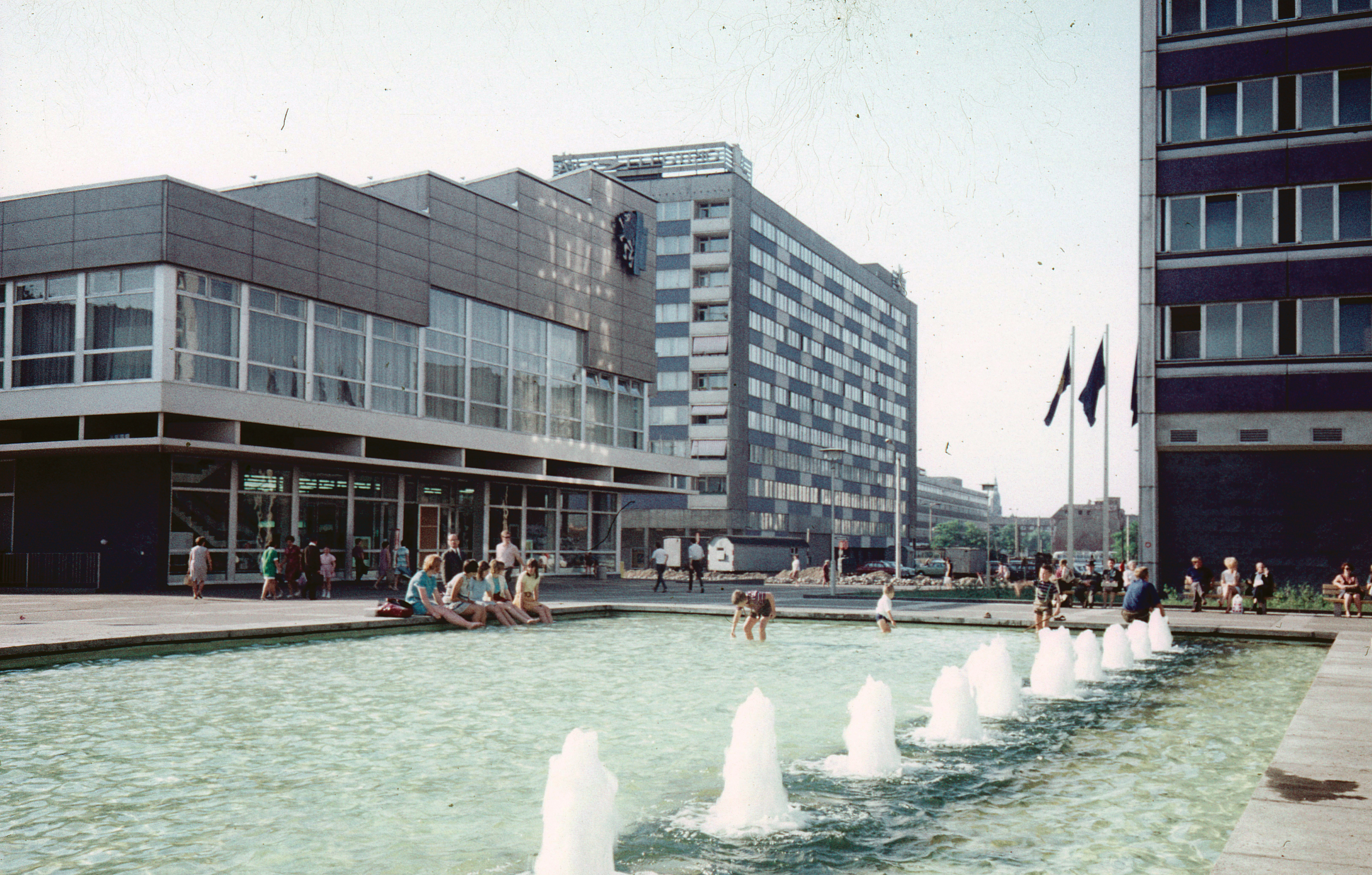 Reichsstrasse a Brühl felé nézve. Location: Germany, Leipzig Tags: colorful, GDR, modern architecture, fountain Title: Reichsstrasse a Brühl felé nézve.